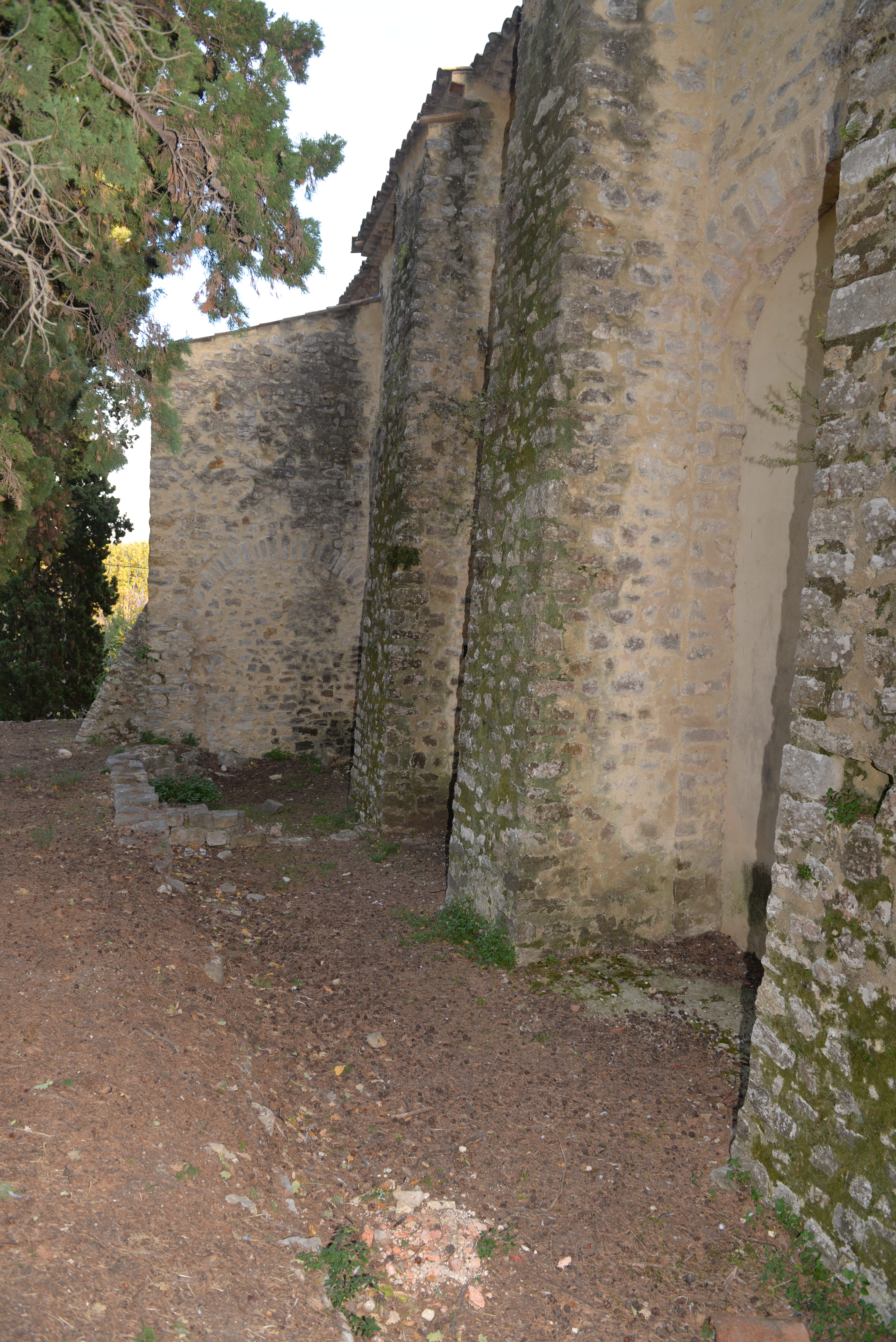 Vue Nord de l'église Notre-Dame du Brusc de Châteauneuf-Grasse